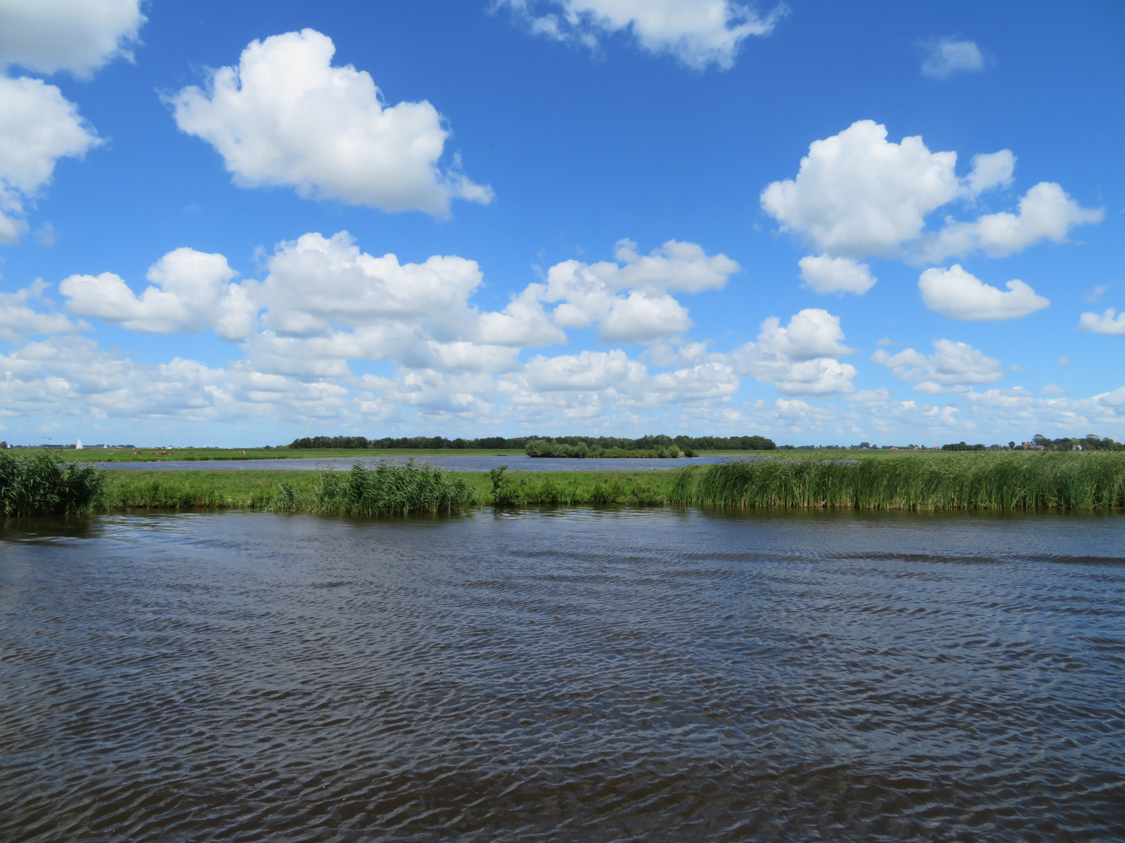 De Zijlroede tussen de Joustersluis en Joure.